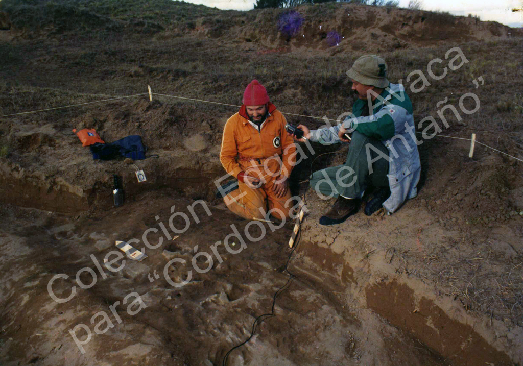 Livio Incatasciato 08 AVACA RIO IV-2P